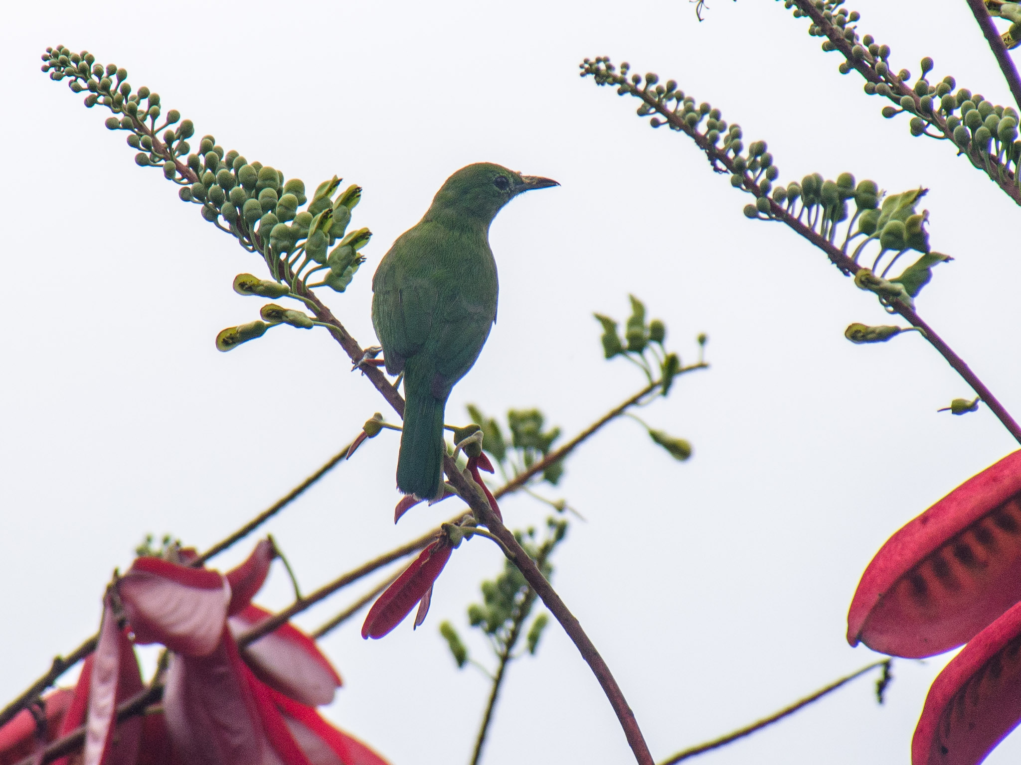 Lesser Green Leafbird